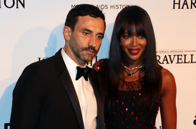 11 - Ricardo Tisci e Naomi Campbell